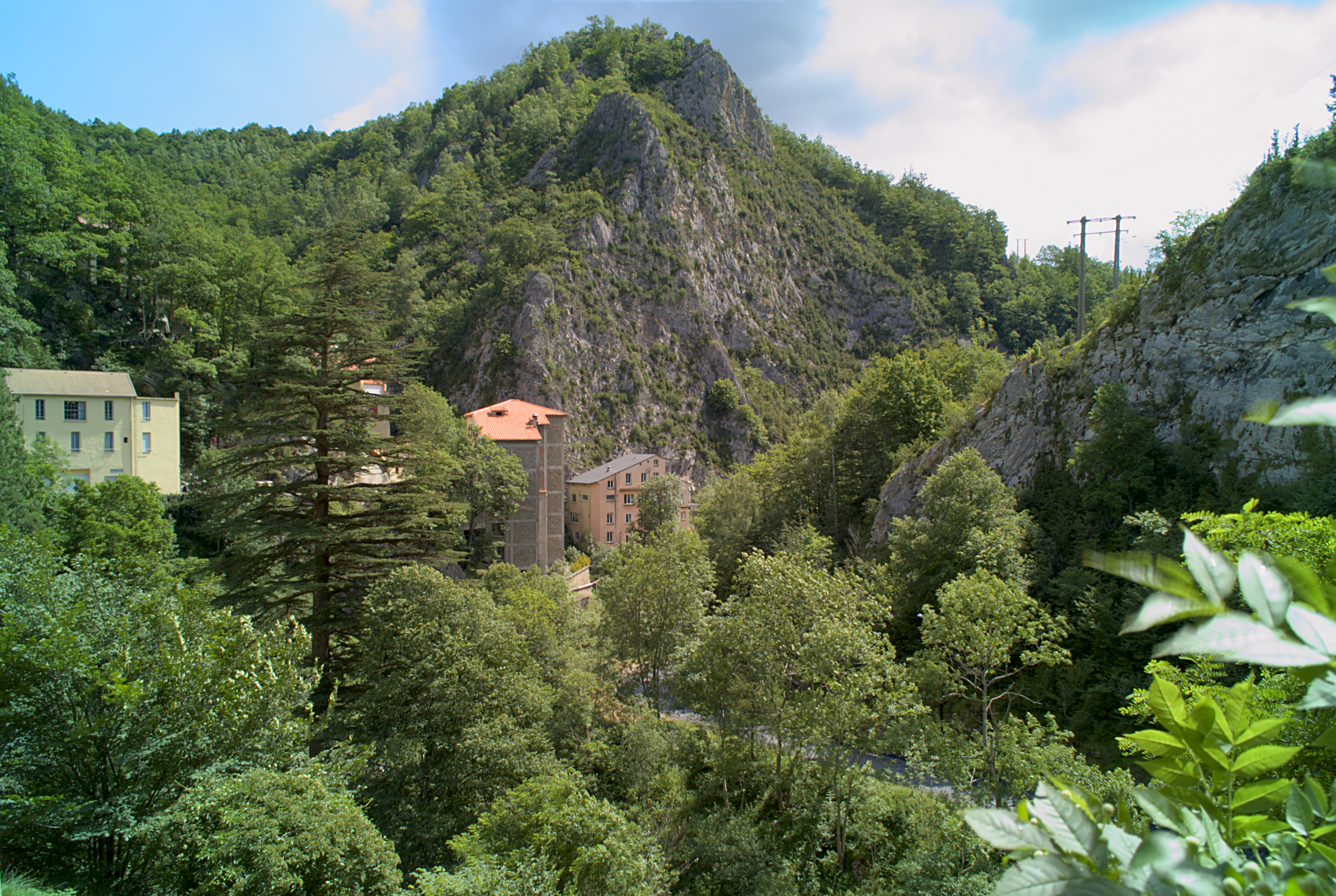 Chapelle Saint-Isidore, La Preste, Prats-de-Mollo-la-Preste (Pyrénées-Orientales, Languedoc-Roussillon, France), La Jonquera (Haut-Ampurdan, Catalogne, Espagne)